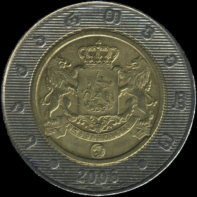 2 Georgian lari (Obverse)